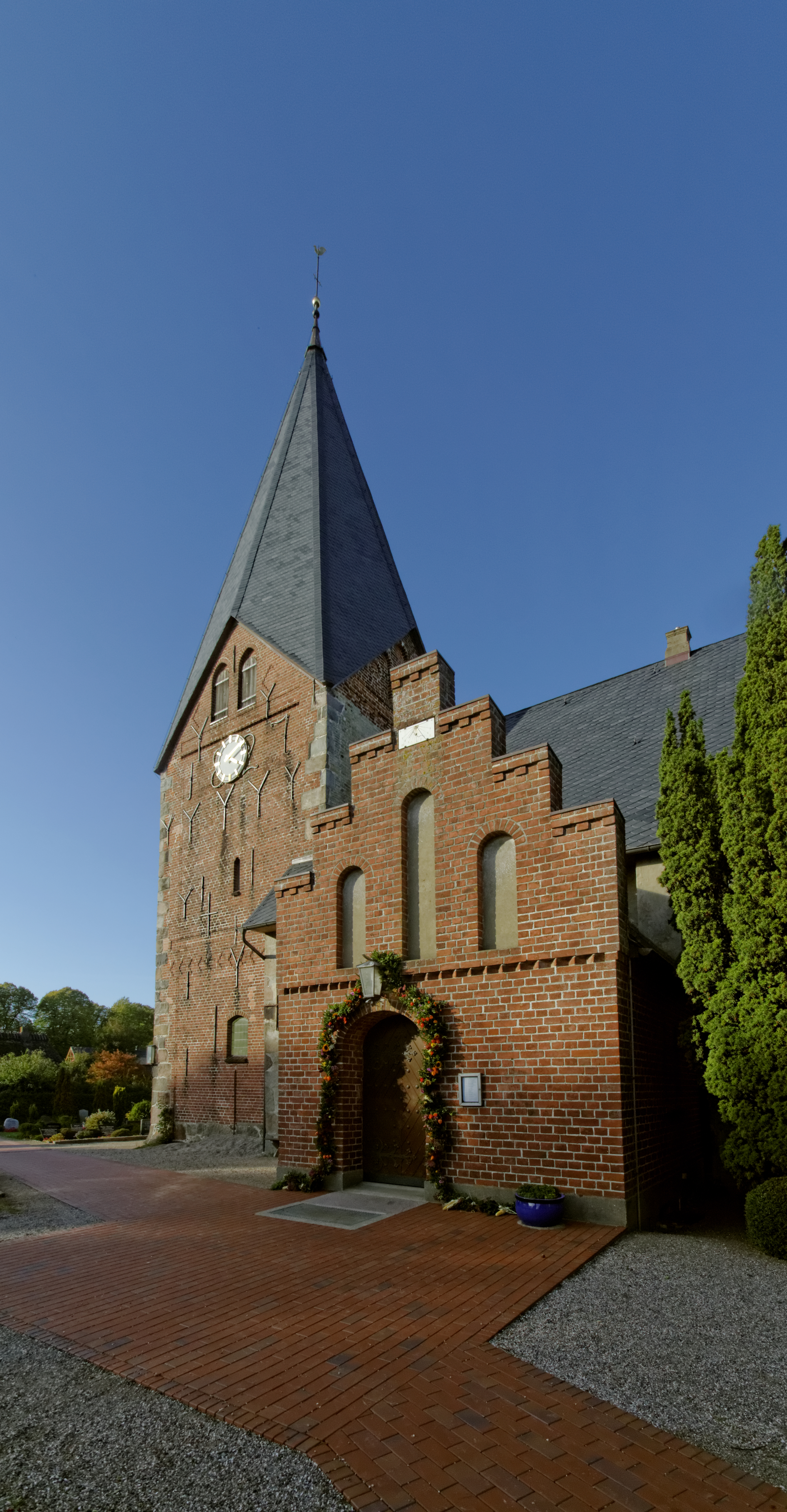 Steinbergkirche-Großquern; Kirche St. Nicolai